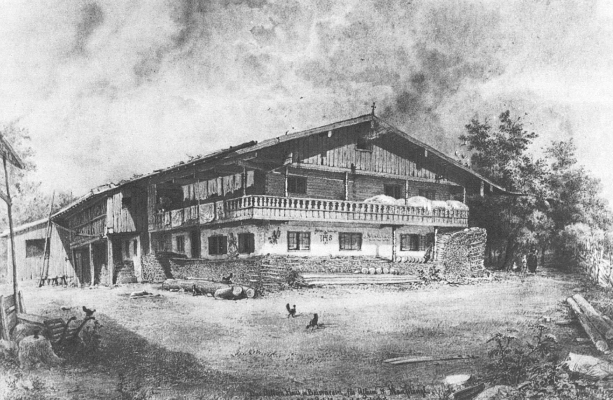 Elternhaus von Franz Hanfstaengl, Ort:Baiernrain